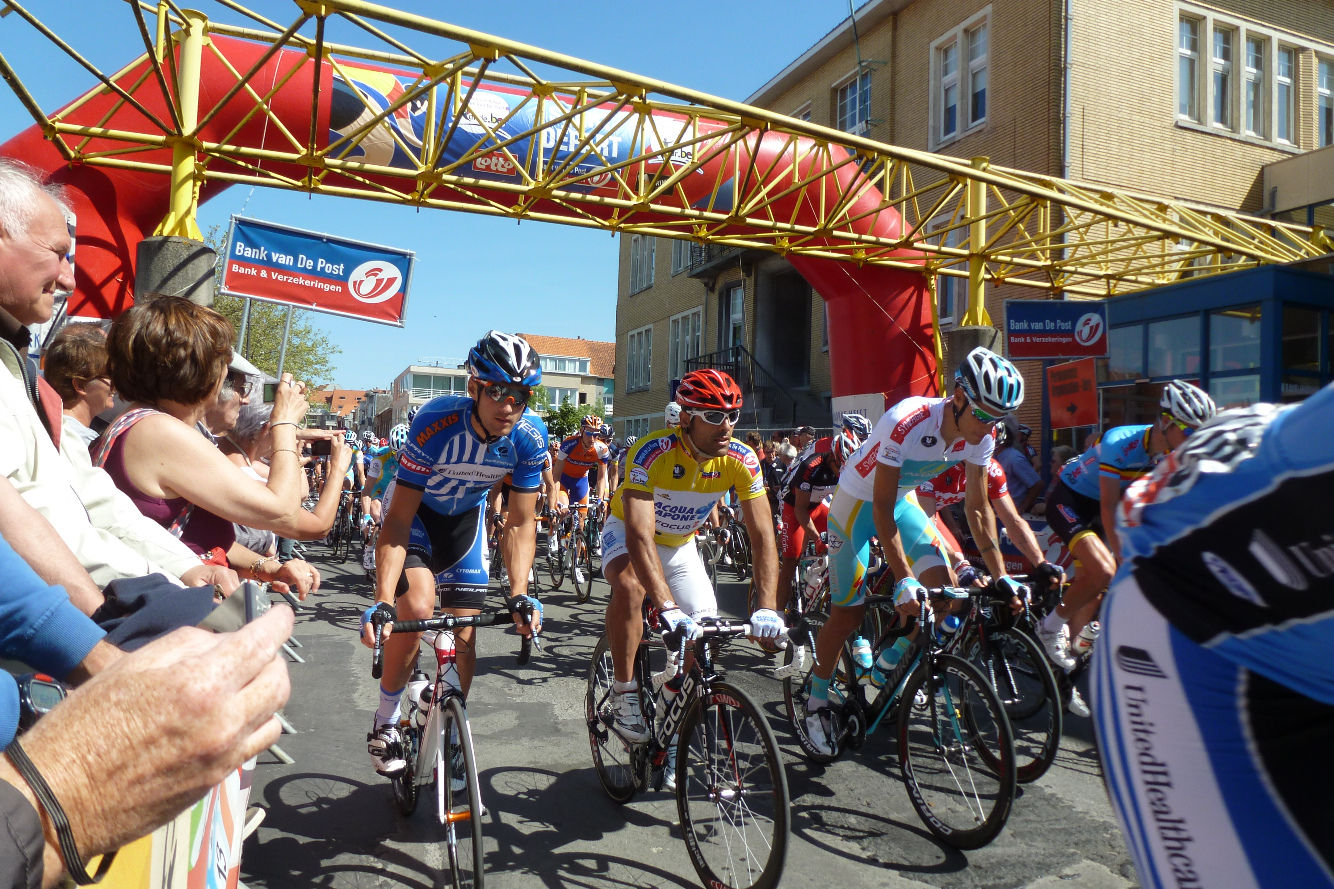 Belgien-Rundfahrt 2012 Start 3. Etappe in Heist